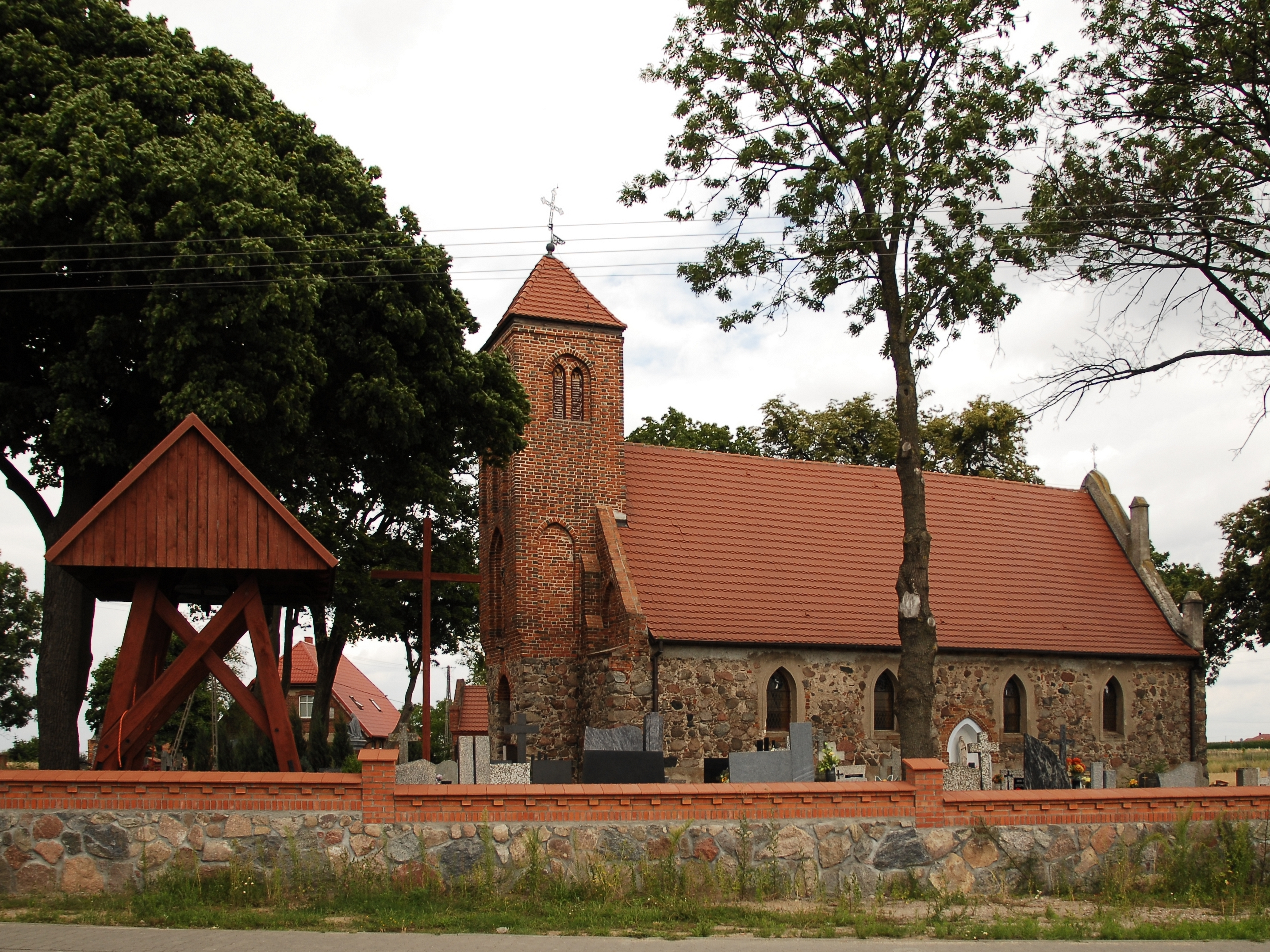 Kościół Podwyższenia Krzyża Świętego w Gorczenicy (gminie Brodnica).